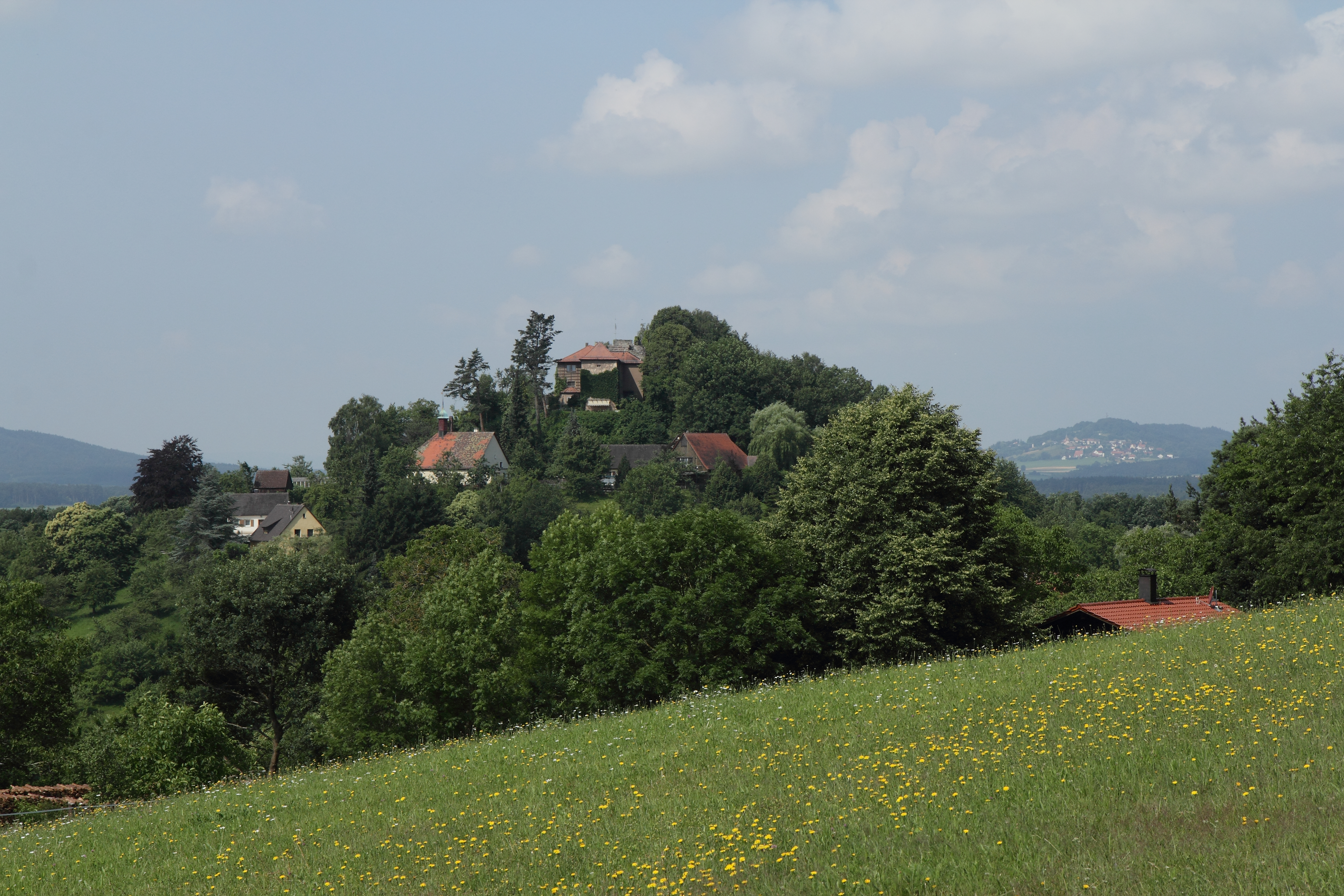 Burgruine Stauf - Ansicht des Burgberges vom östlich angrenzenden Altenberg aus